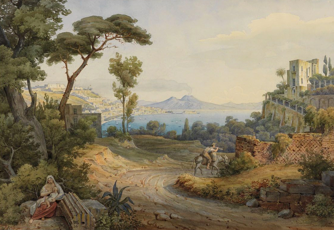 Naples 1836.